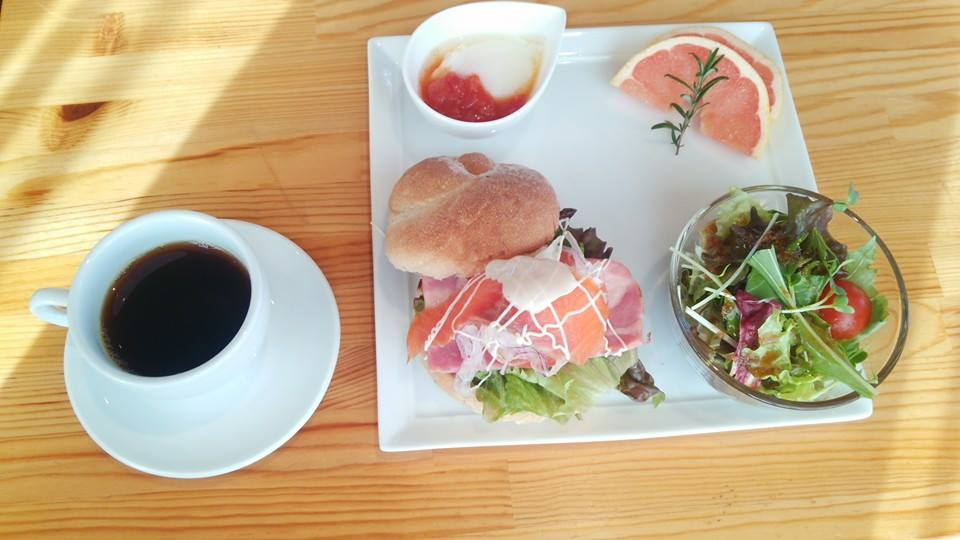 THE FARM CAFE 朝食 2015.01.13